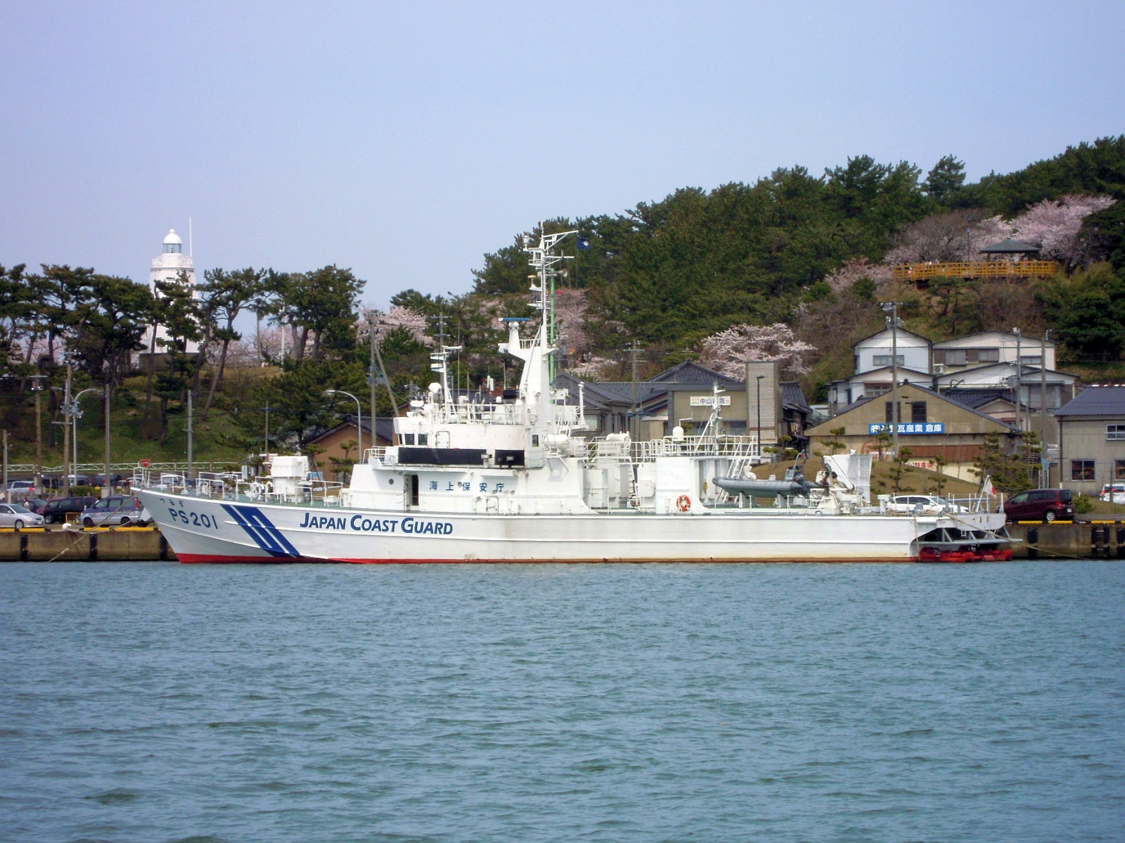 海上保安庁の巡視船PS201「つるぎ」。山形県酒田市の酒田港にて。